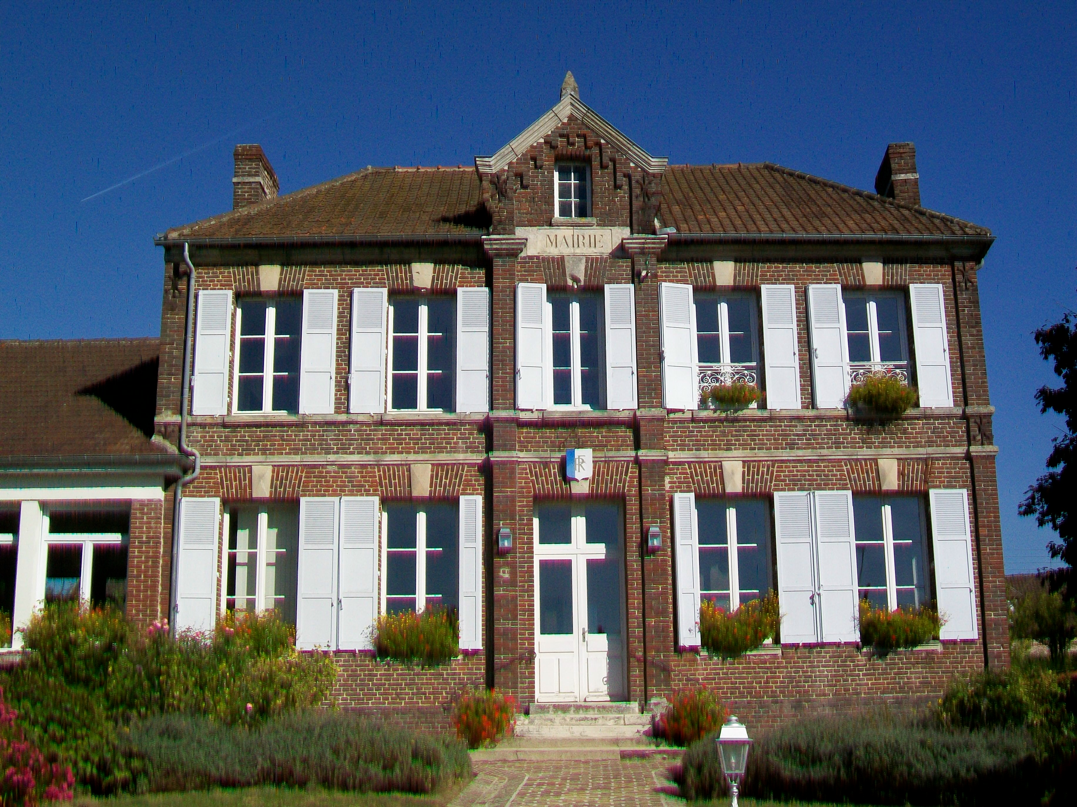 La mairie de Jonquières, rue de l'Archerie, près de l'église.